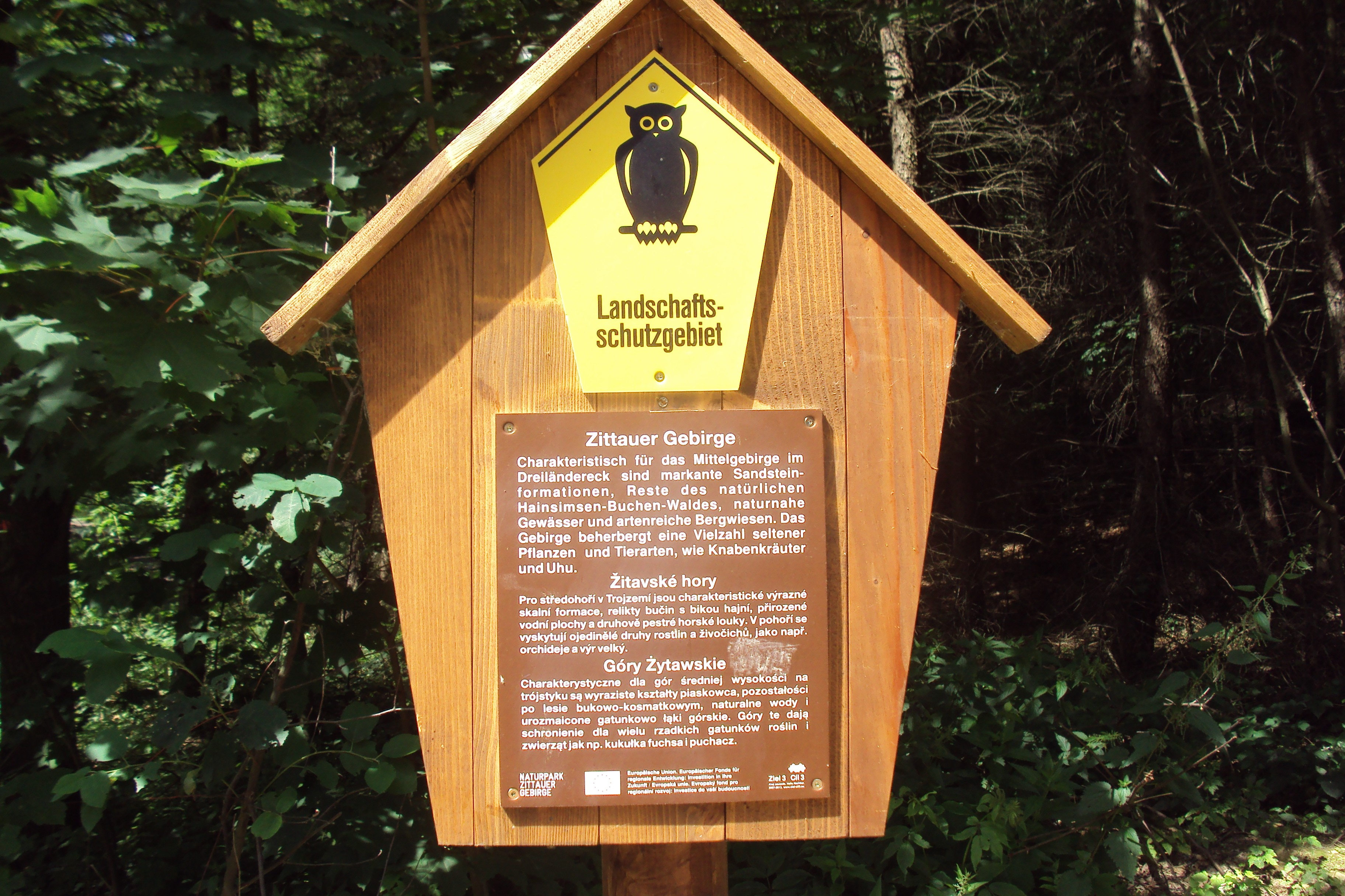 Na patě hory Hvozd, na červené trase turistů E3 už na německé straně hranice je českoněmecká infotabule Žitavských hor